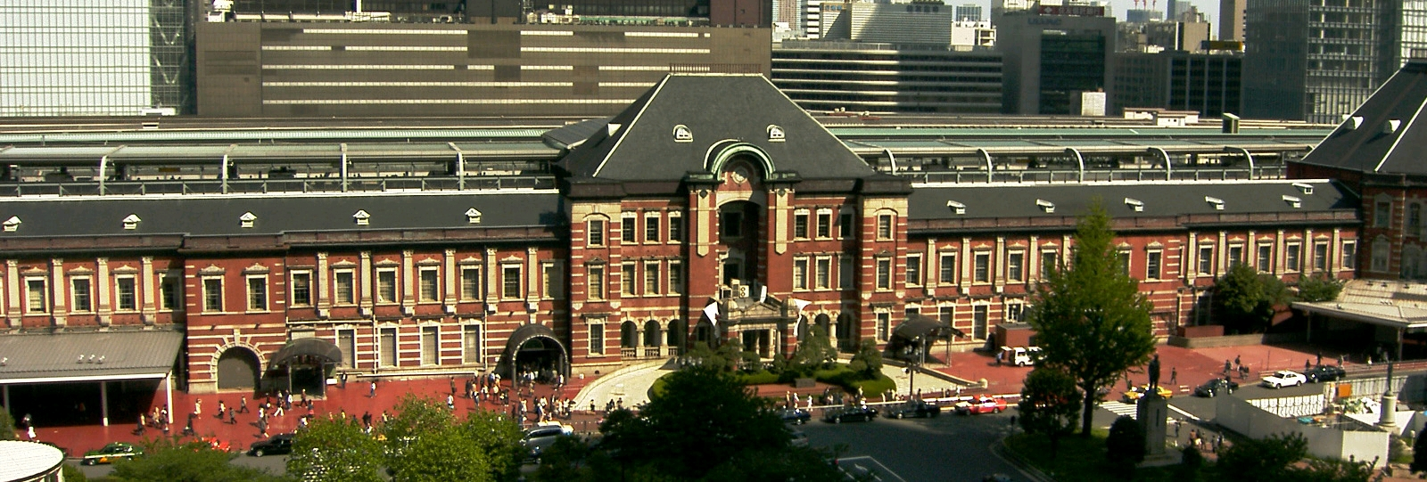 “Tokyo Station” Japan